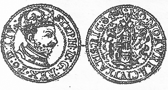 Moneta polska miasta Rygi